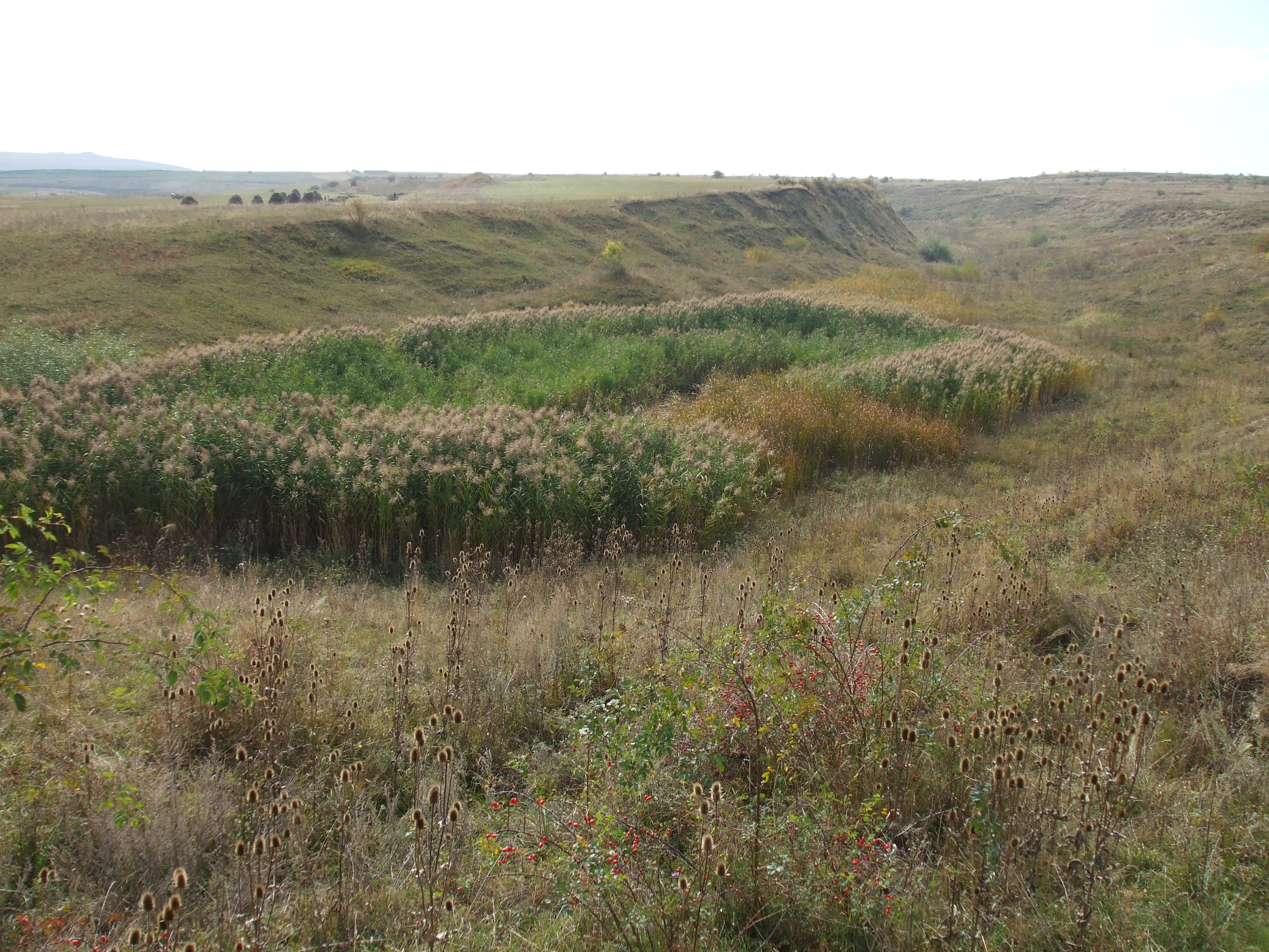 Aruncuta - Crevasa aparuta in anul 1905 si care adaposteste Lacul din dos , cu adincime initiala de 12 -15m.